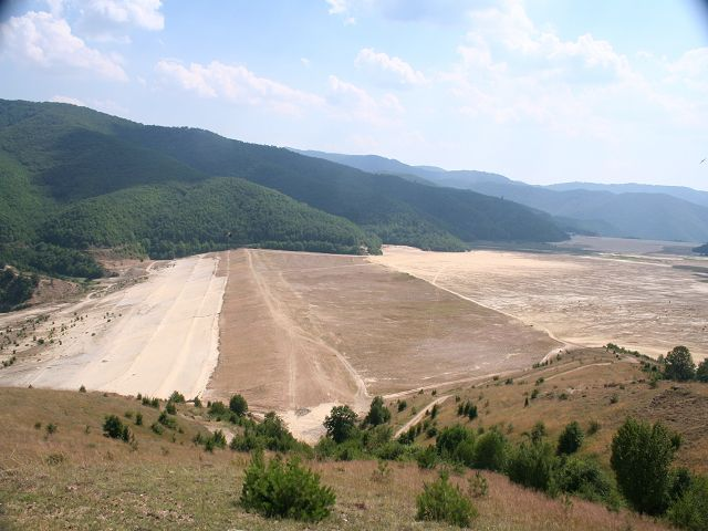 Deponie für schwermetallhaltige der Bergbau- und Kupfermetallurgie in der Industrieregion Srenda Gorie